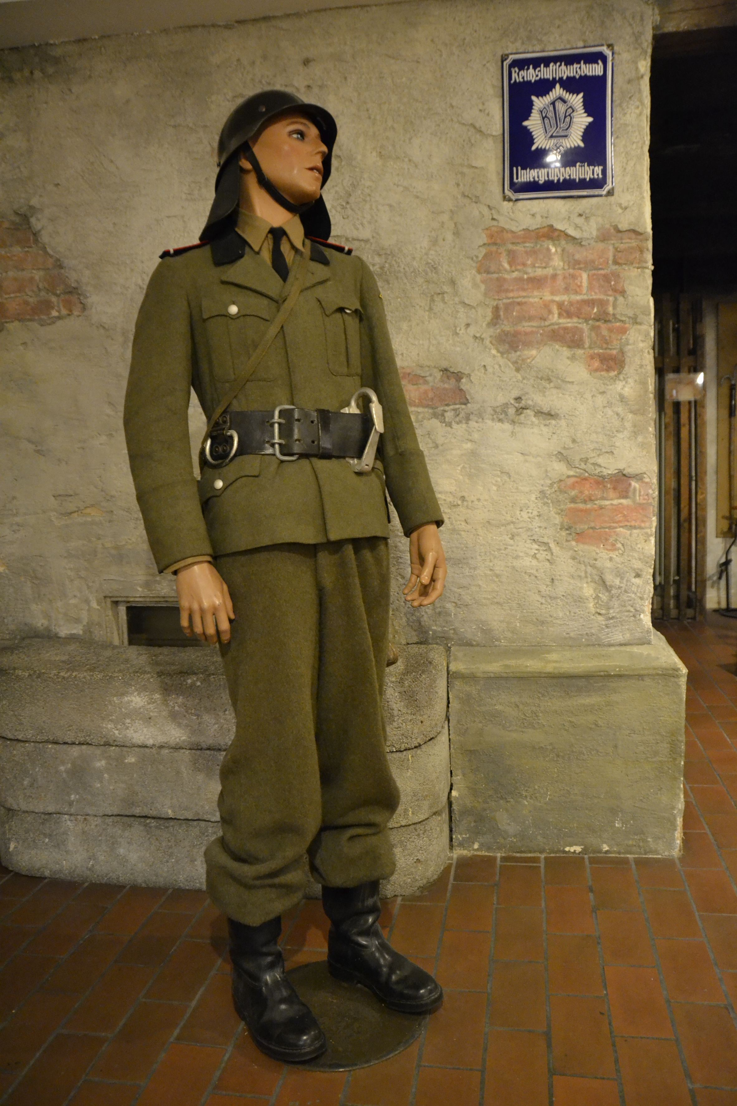 Ausstellungsstücke des Feuerwehrmuseums München.